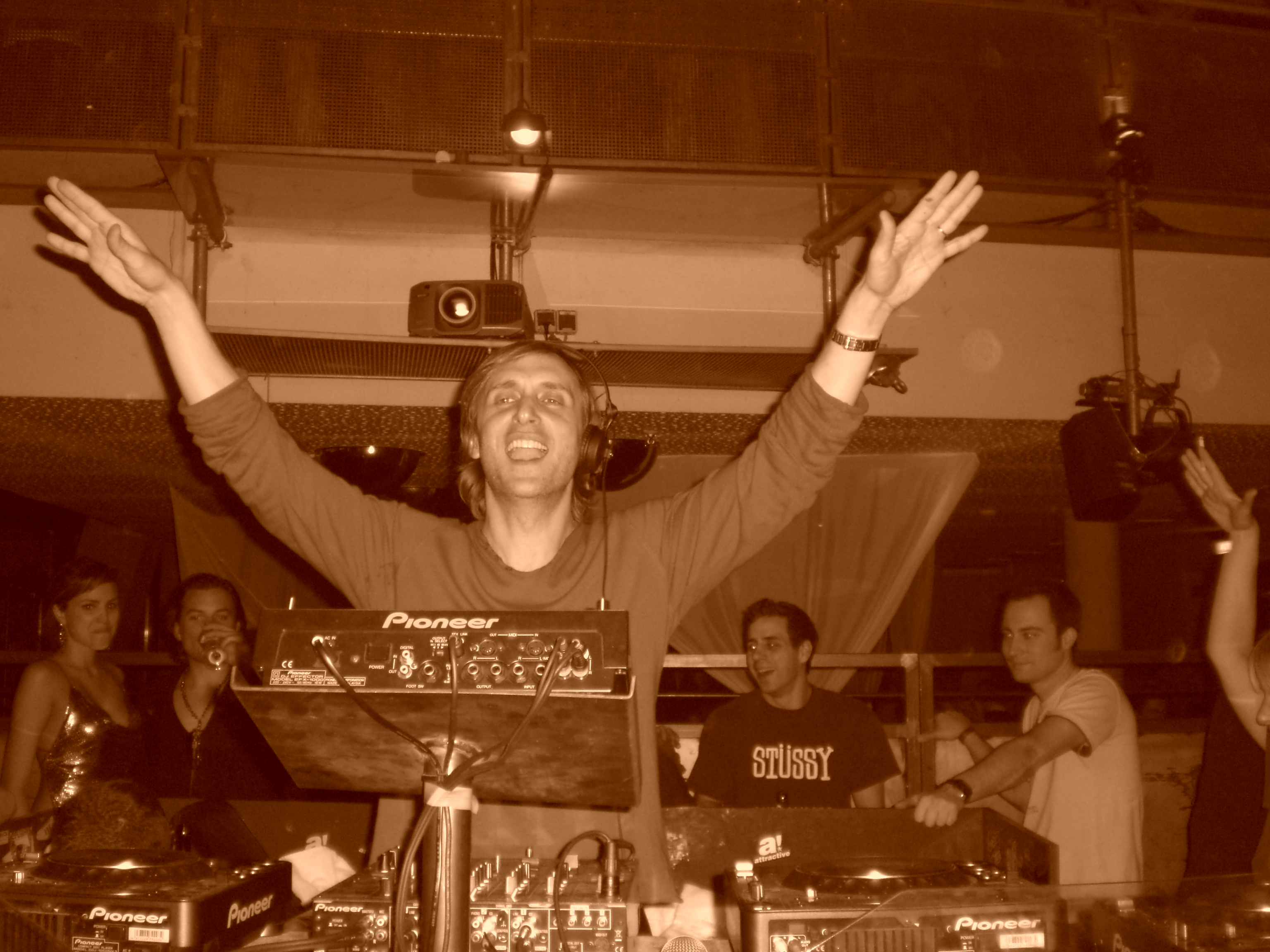 David Guetta am Mischpult im 3001, Düsseldorf